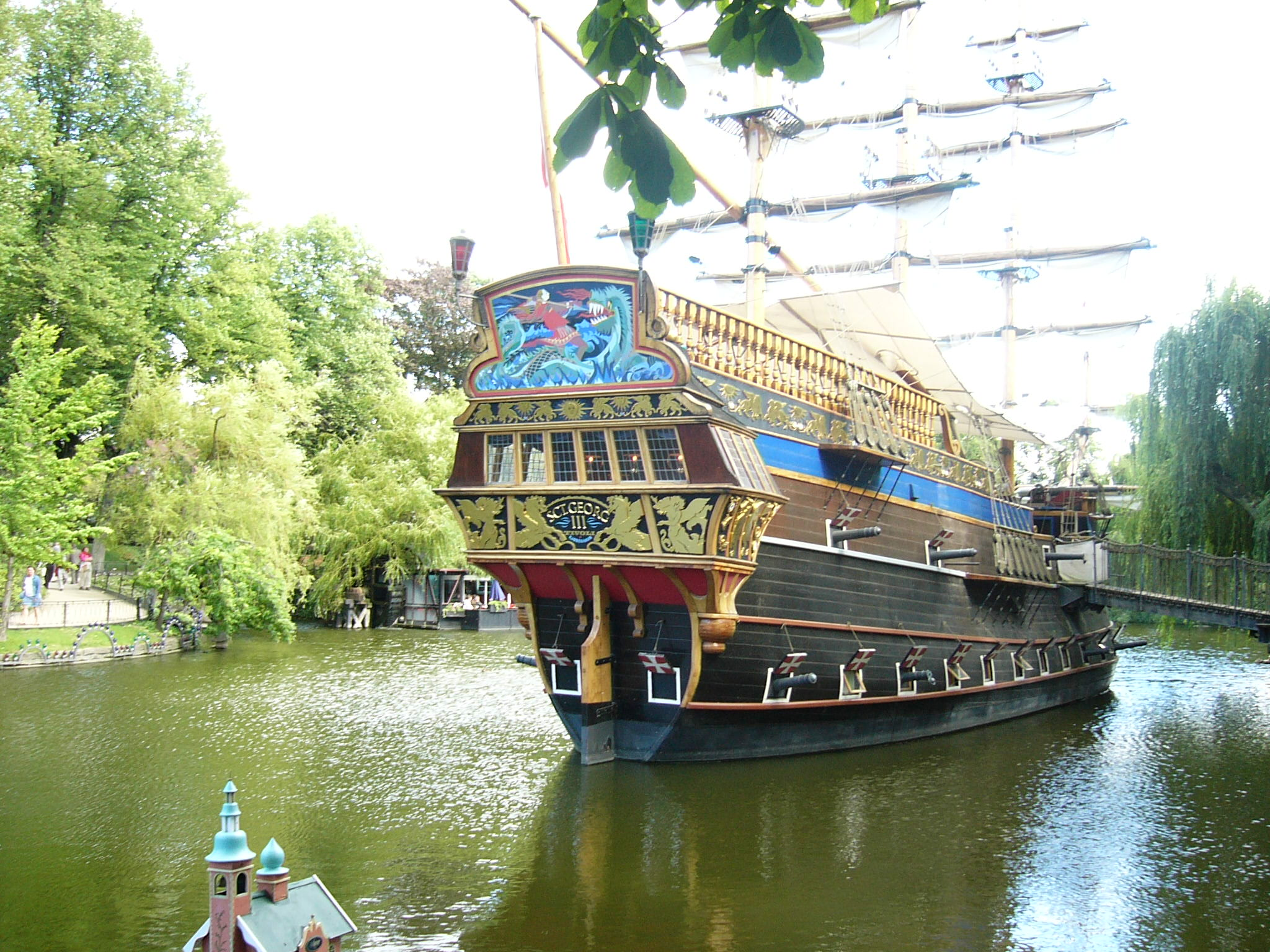 Imaxe lago Tivoli